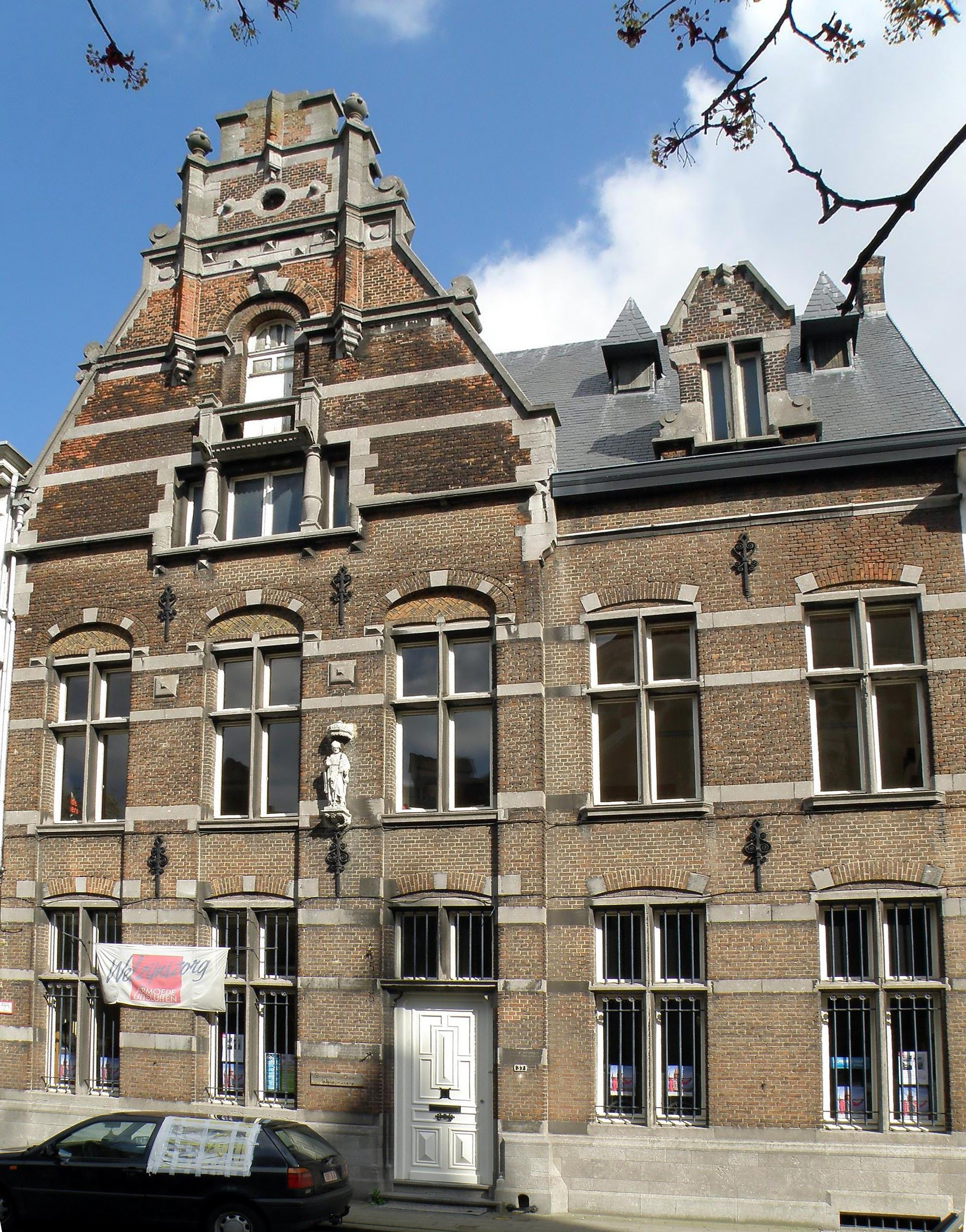 Anvers, Belgique. Presbytère en style néo-renaissance flamande de l'église paroissiale (néo-gothique) Saint-Willibrord (en néerl. Sint-Willibrorduskerk), sis Pastorijstraat. Oeuvre de Henri et Léonard Blomme (date d'achèvement 1888).